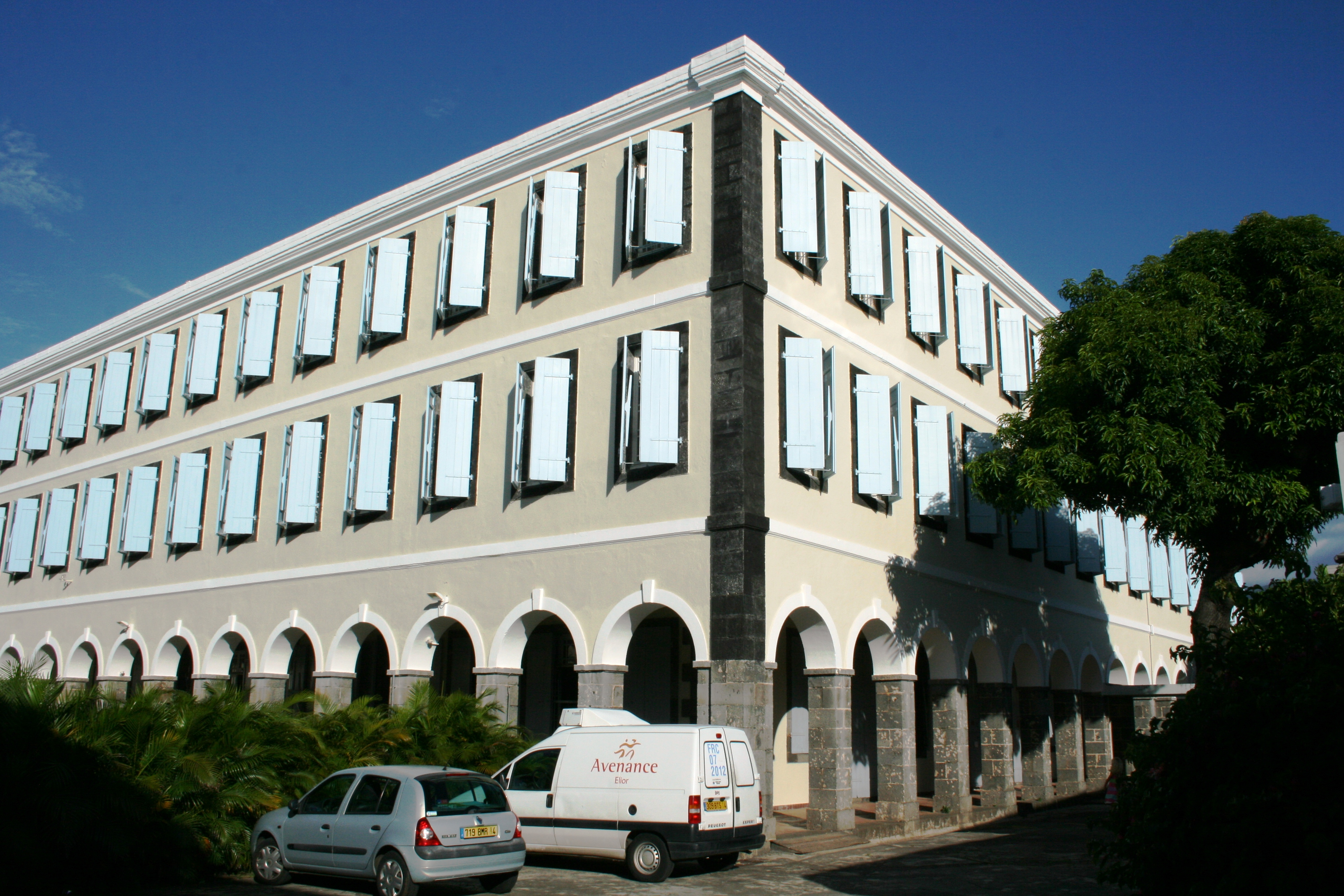 Aperçu d'un angle du pensionnat de l'Immaculée Conception, à Saint-Denis de La Réunion.